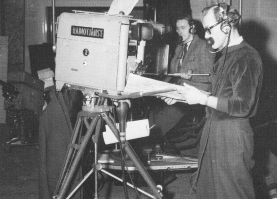 TV-kamera hos Radiotjänst i Stockholm